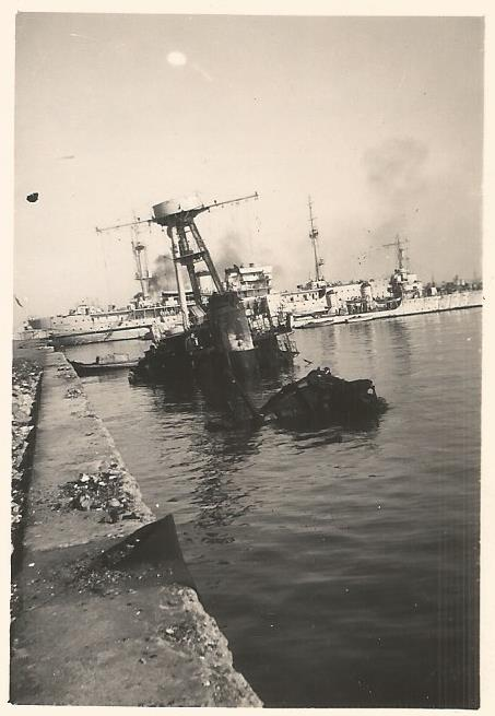 L'épave du mouilleur de mines Pluton le long de la jetée Delure dans le port de Casablanca le lendemain ou les jours suivant son explosion qui eut lieu le 13 septembre 1939. Photographie d'un membre de la famille qui a survécu aux explosions.